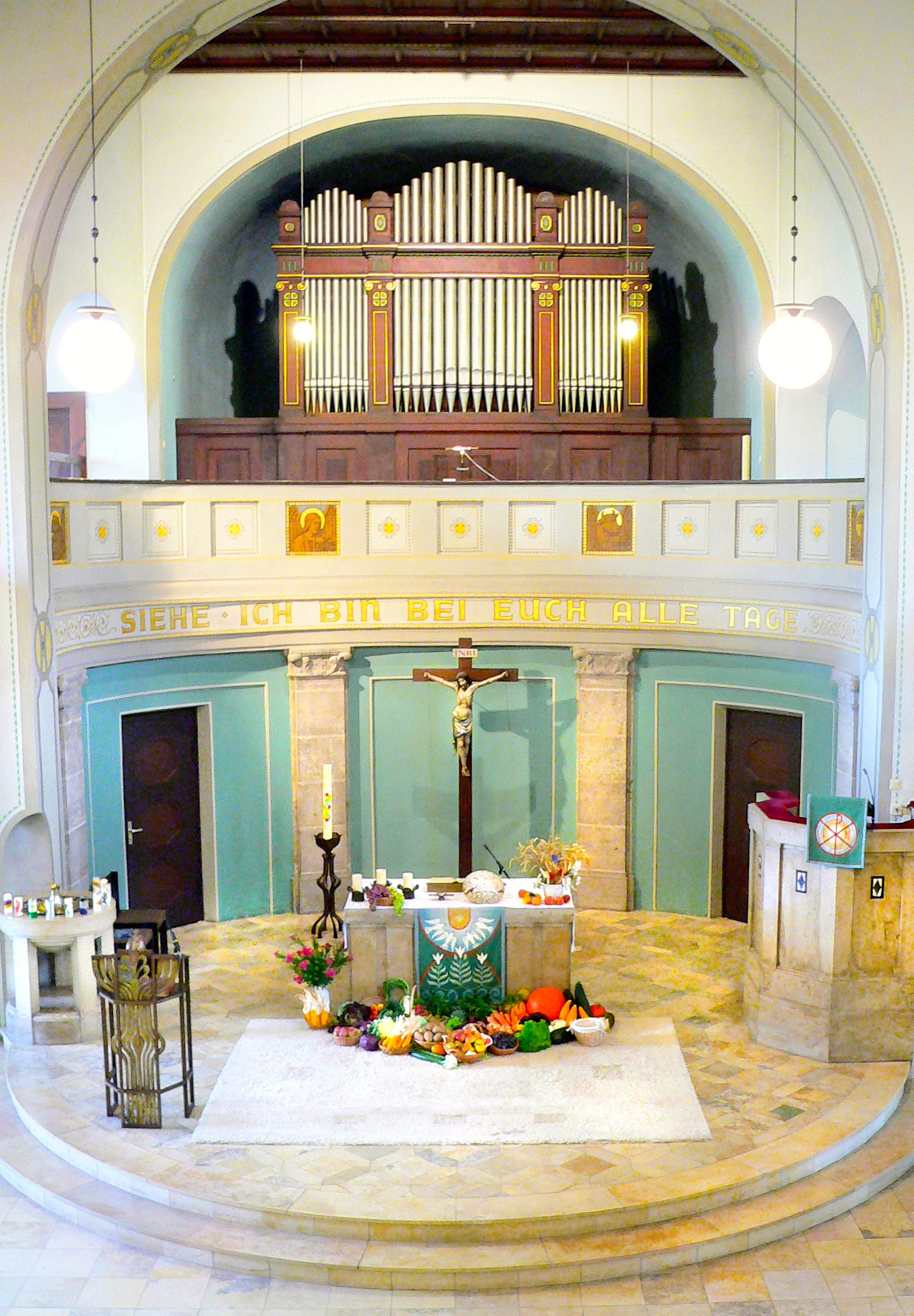 Erntedankaltar